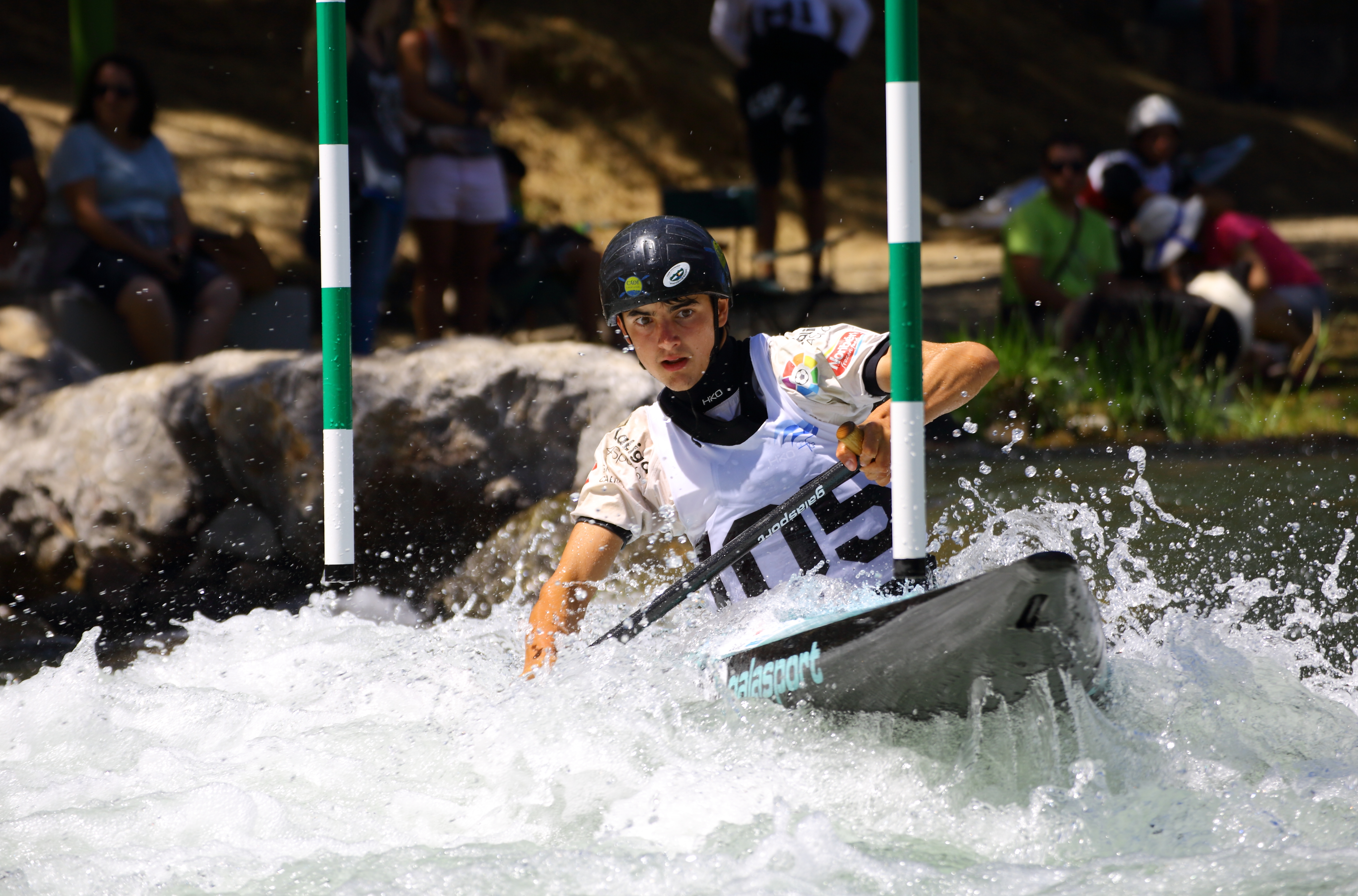 Alejico, Sabero, Leon. Celebrado el 5 y 6 de agosto